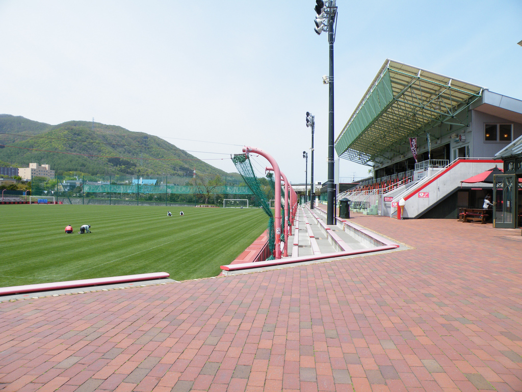 宮の沢白い恋人サッカー場 Miyanosawa "Shiroi-Koibito" Football Stadium 北海道札幌市西区宮の沢2条3丁目 Miyanosawa 2-jo 3-chome, Nishi-ku Sapporo, Hokkaido, Japan.